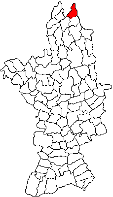 Categorie:Hărţi ale judeţului Olt